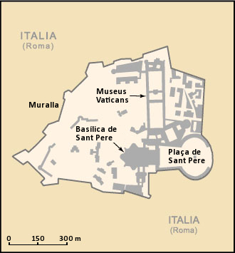 Mapa de la ciutat del Vaticà